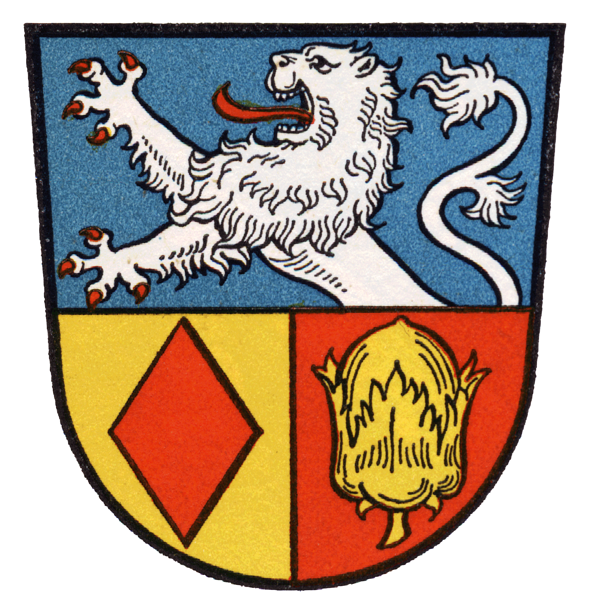 Wappen von Aßlar